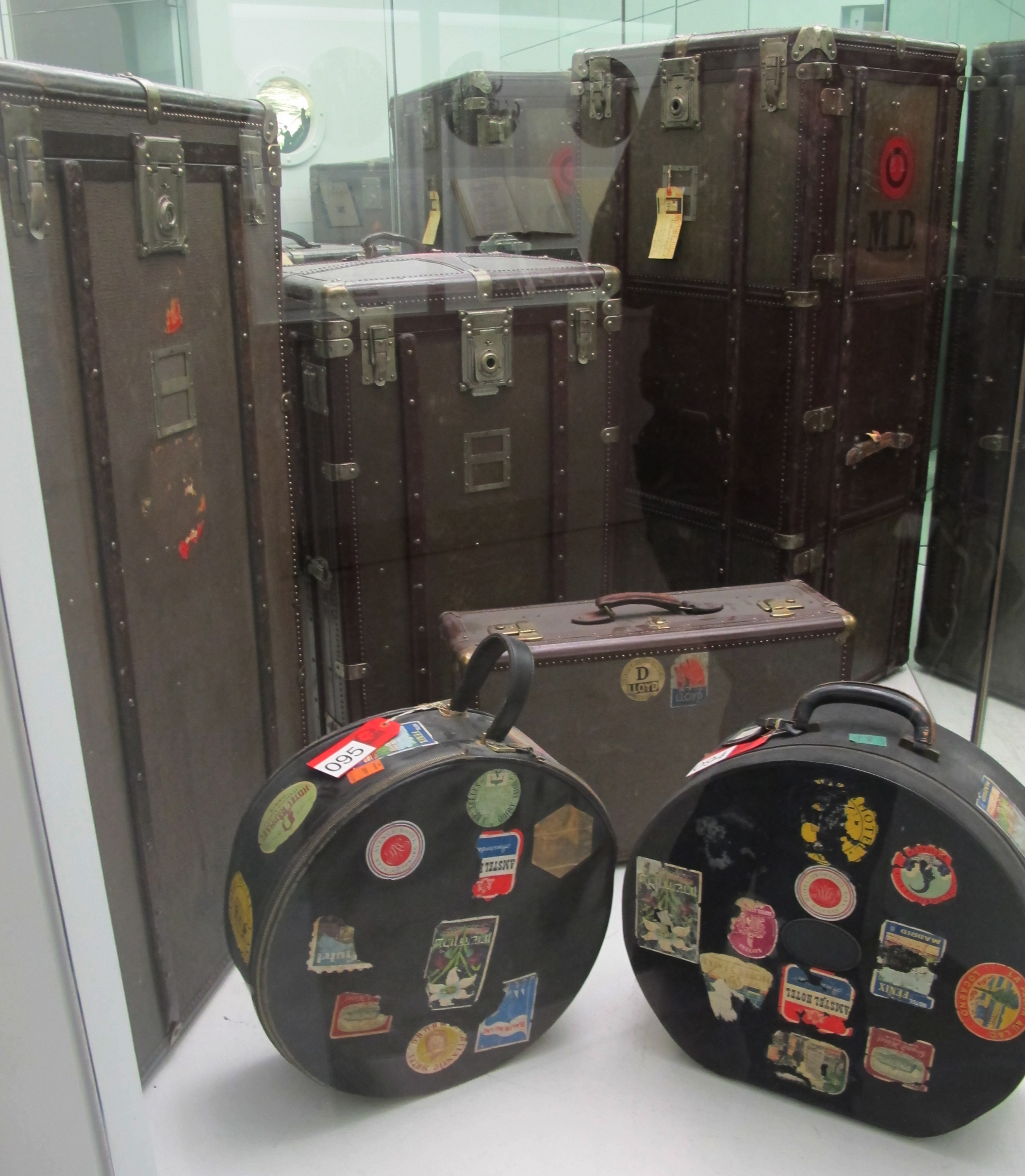 Set di valigie personale di Marlene Dietrich.